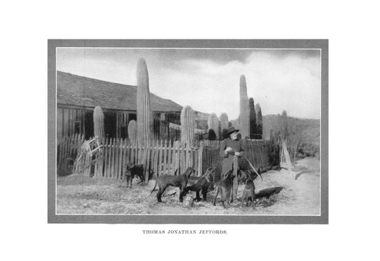 Tom Jeffords vor seinem Haus, am Lattenzaun mit 5 Hunden